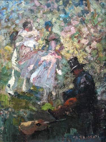 Musiciens au parc